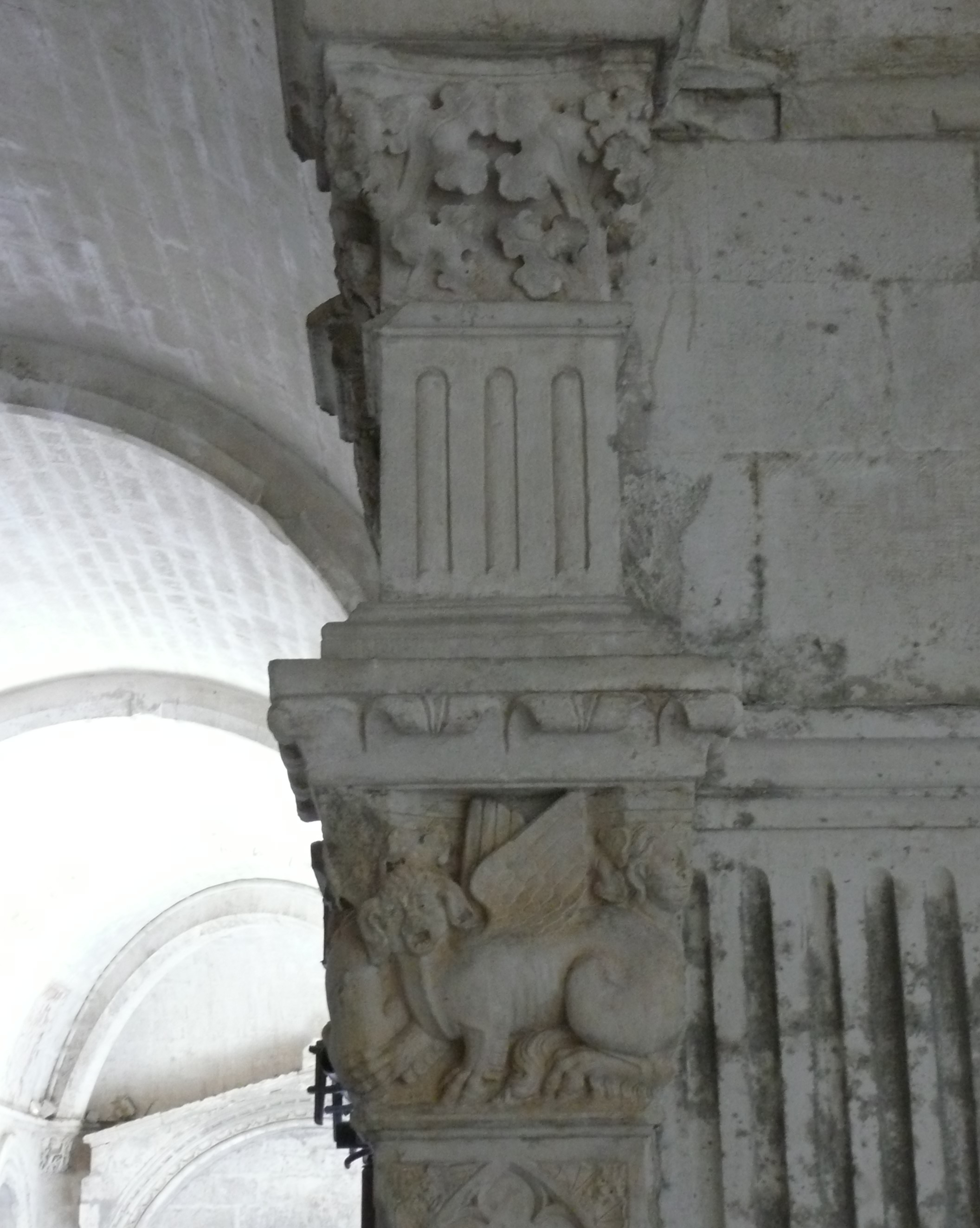 Arles (Bouches-du-Rhône_France), abbaye de Montmajour, cloître, angle nord-ouest, pilastre d'angle gothique représentant sur sa face ouest une chimère.